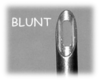 Stumpfe Nadel zur Knopflochpunktion